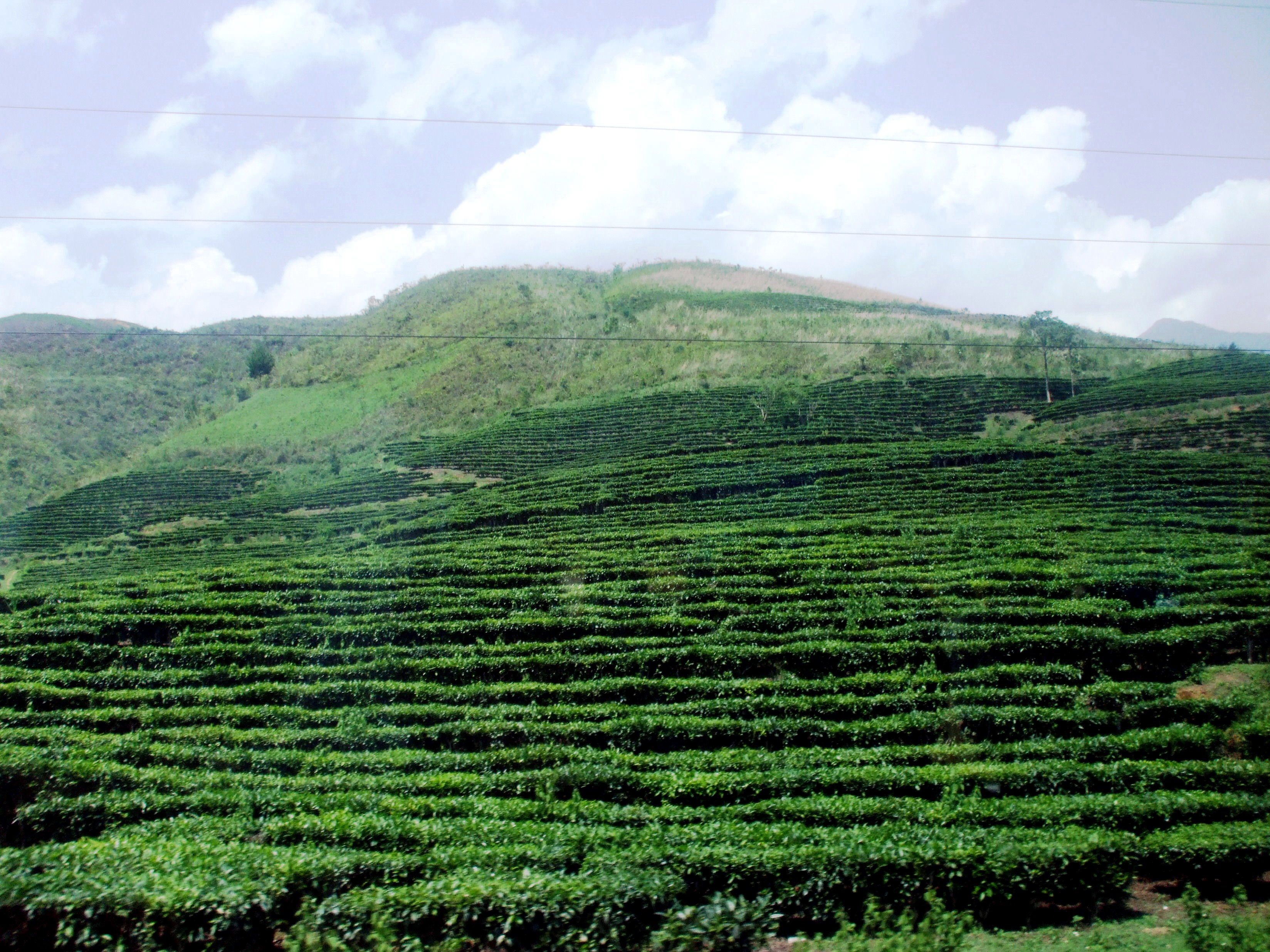 Đồi chè (trà) ở Phú Thọ, Việt Nam.